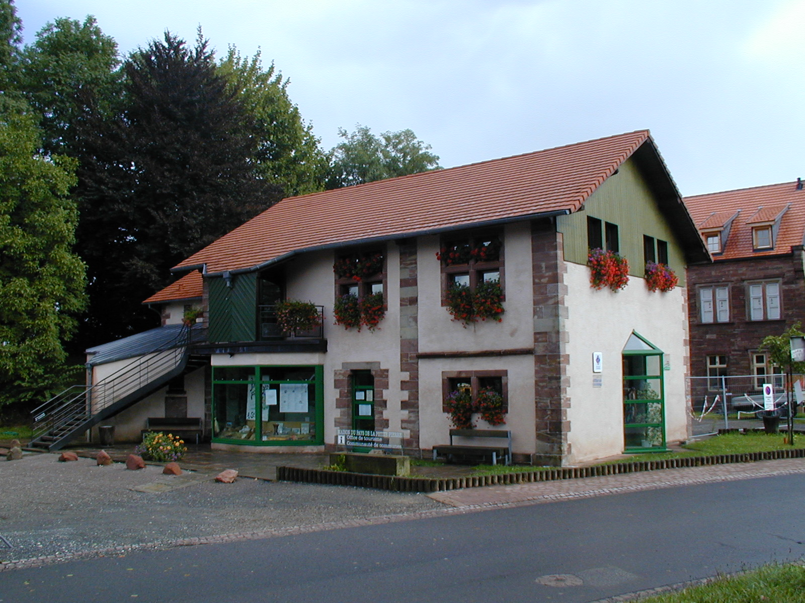 Maison du Pays - Office de Tourisme et siège de la Communauté de Communes